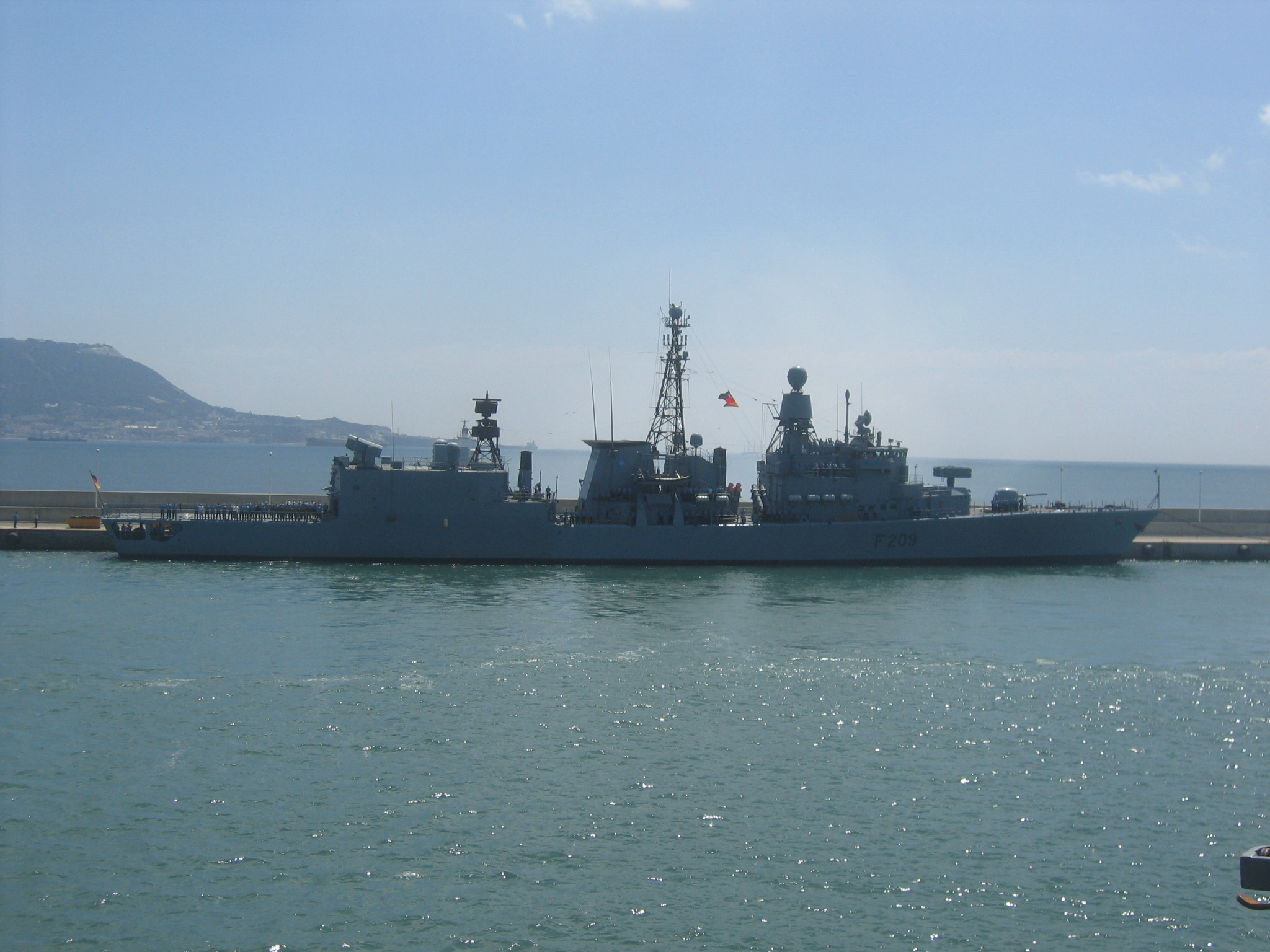 Fregatte Rheinland-Pfalz F209 aufgenommen im Hafen von Algeciras (Spanien) von der Fregatte Emden aus